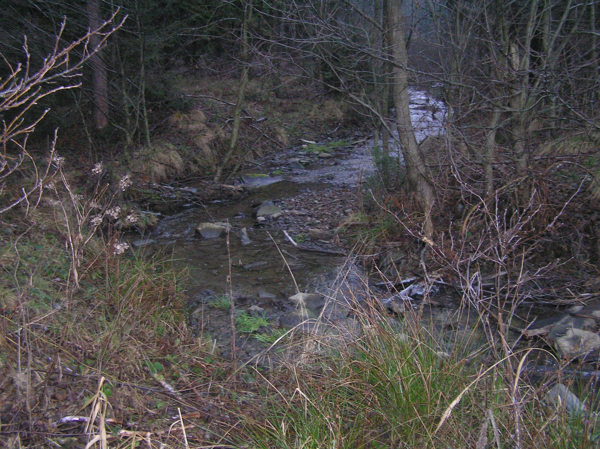 Plazský potok (Plazský Creek), Czech Republic